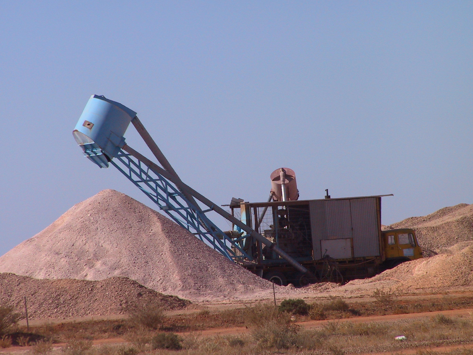 Maschine zur Gewinnung von Opalen in Coober Pedy